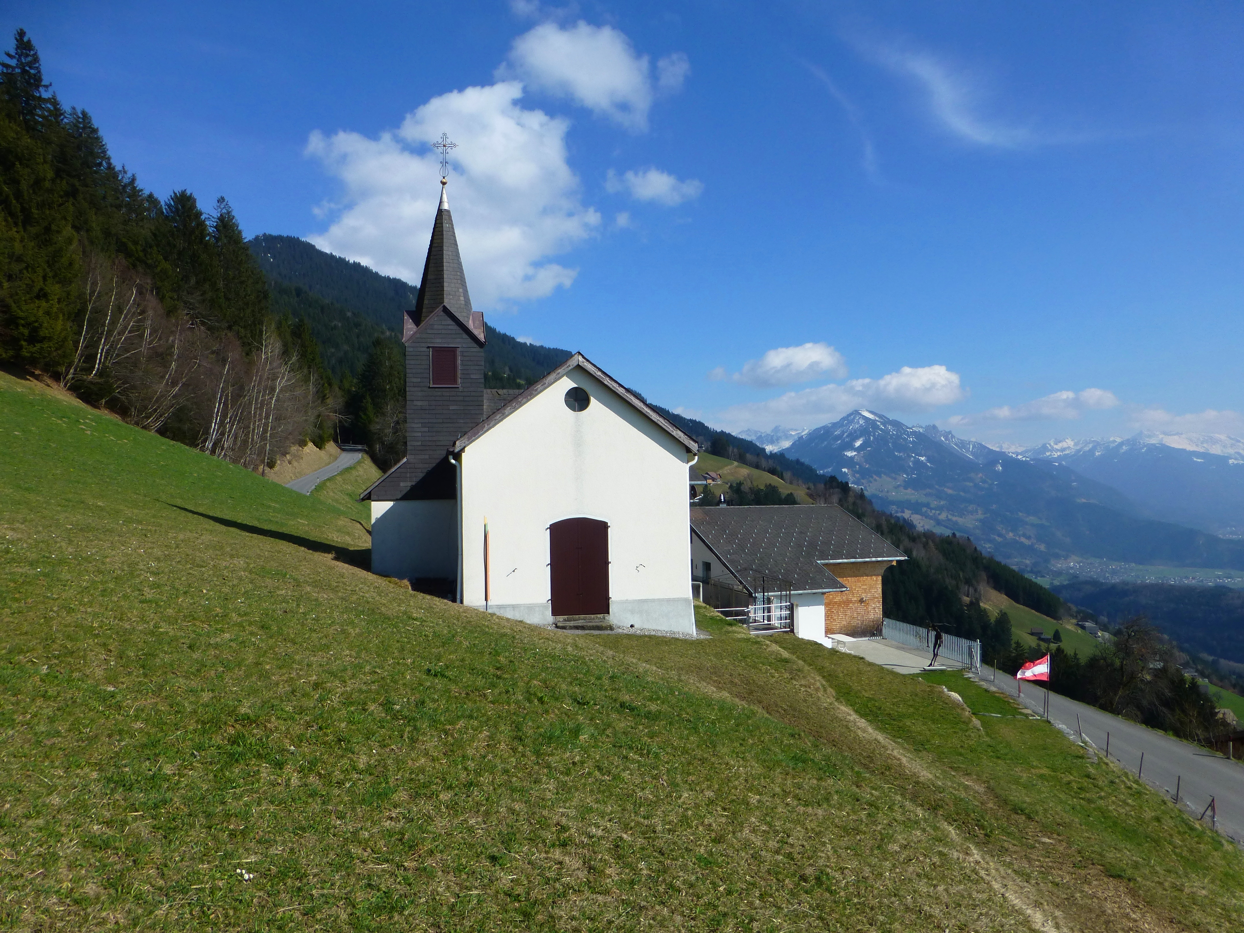 Ostansicht der Kapelle in der Dünserberger Parzelle Bischa, geweiht dem Heiligen Benedikt